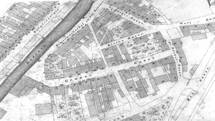 Danzig, Brabank.